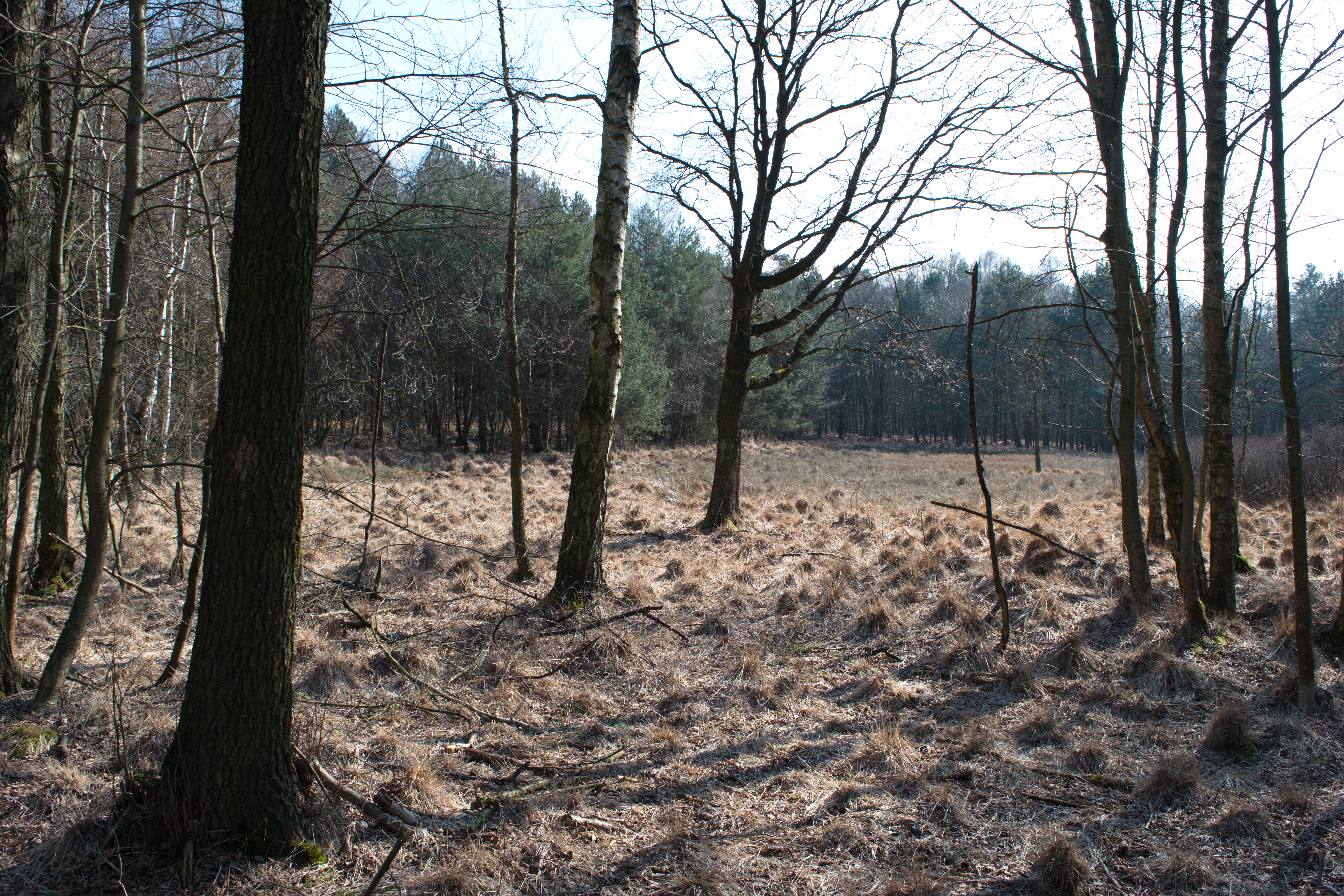 Hildener Heide, Hilden